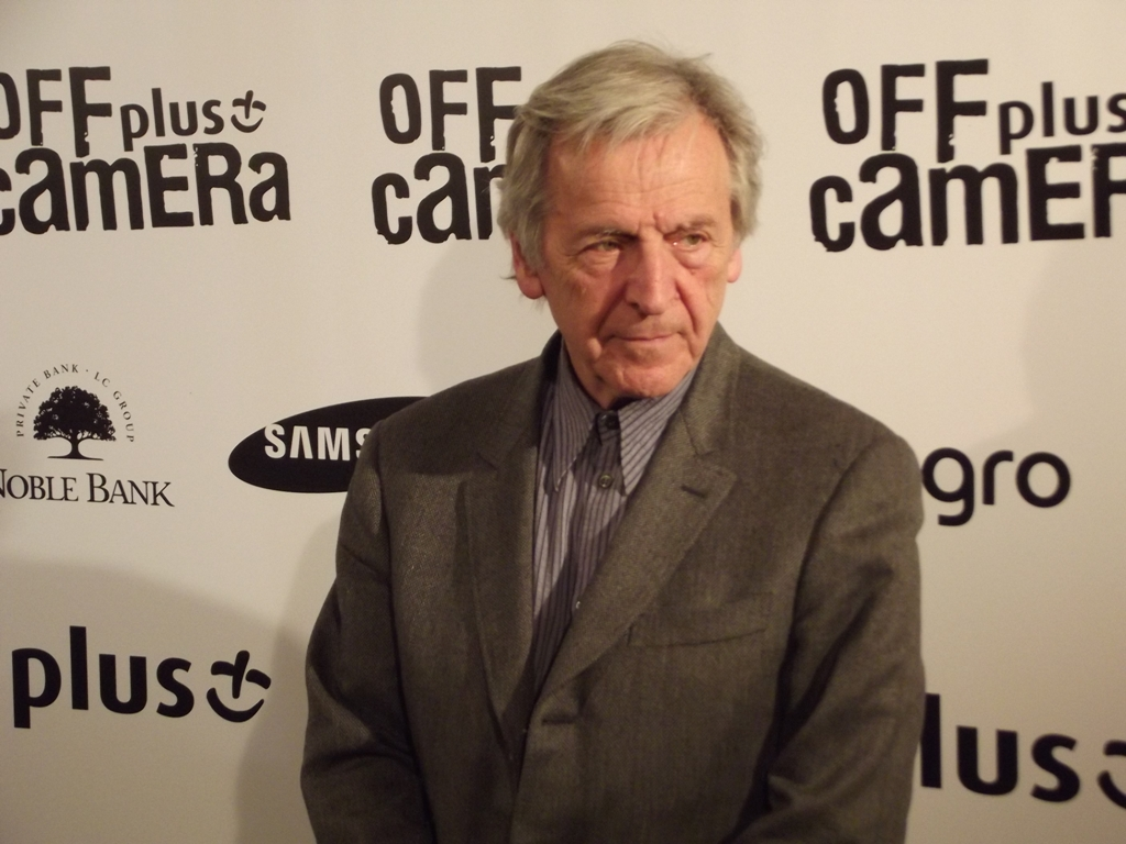 Zdjęcie zrobione podczas 6. edycji międzynarodowego festiwalu kina niezależnego Off Plus Camera.